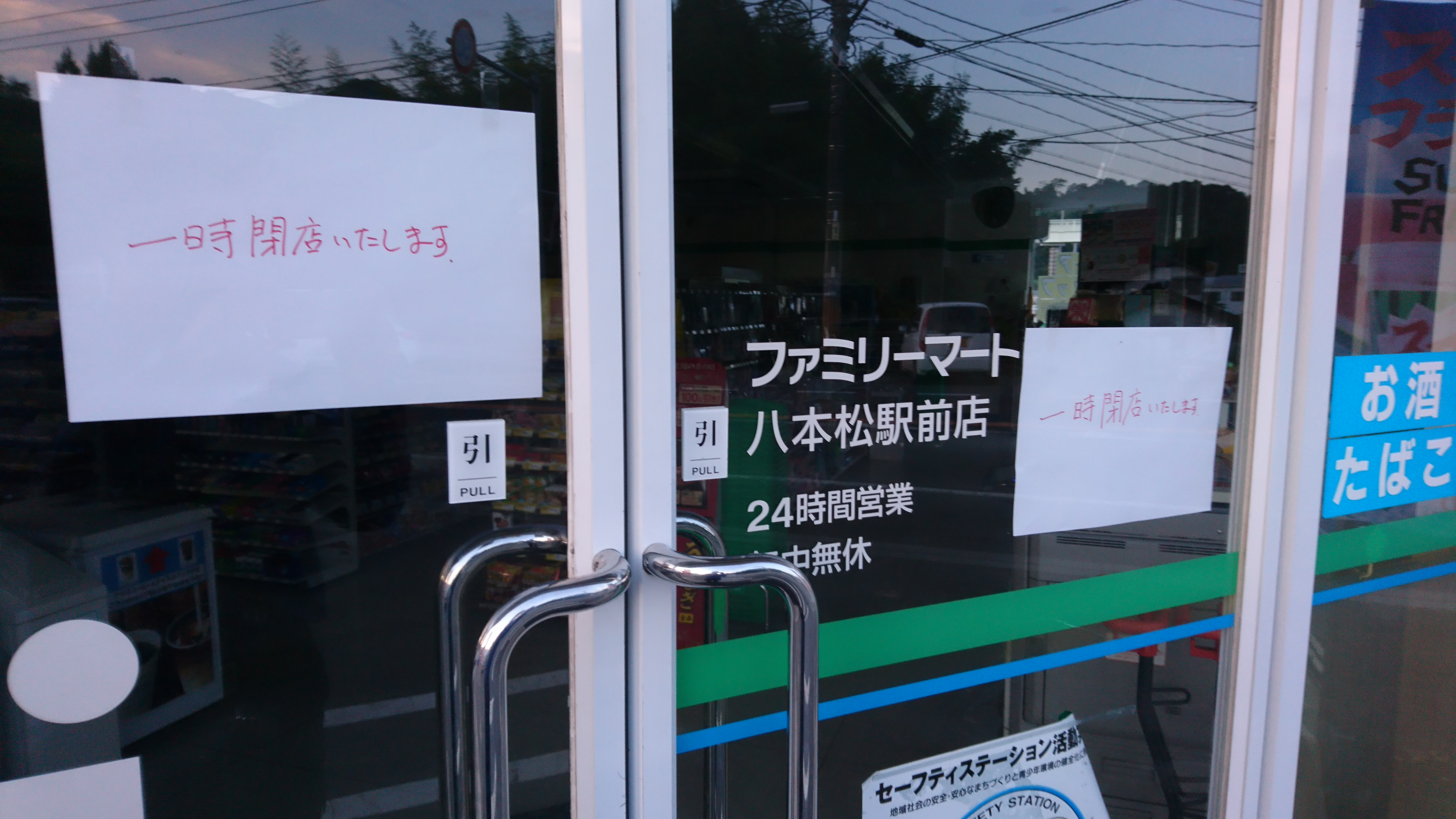 大雨被害により臨時閉店中のファミリーマート八本松駅前店